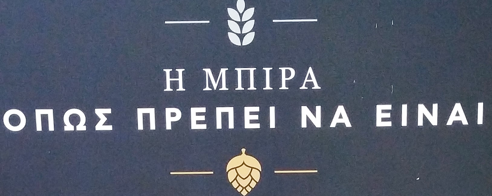 Για να τονιστεί η ορθογραφία της λέξης «μπίρα»